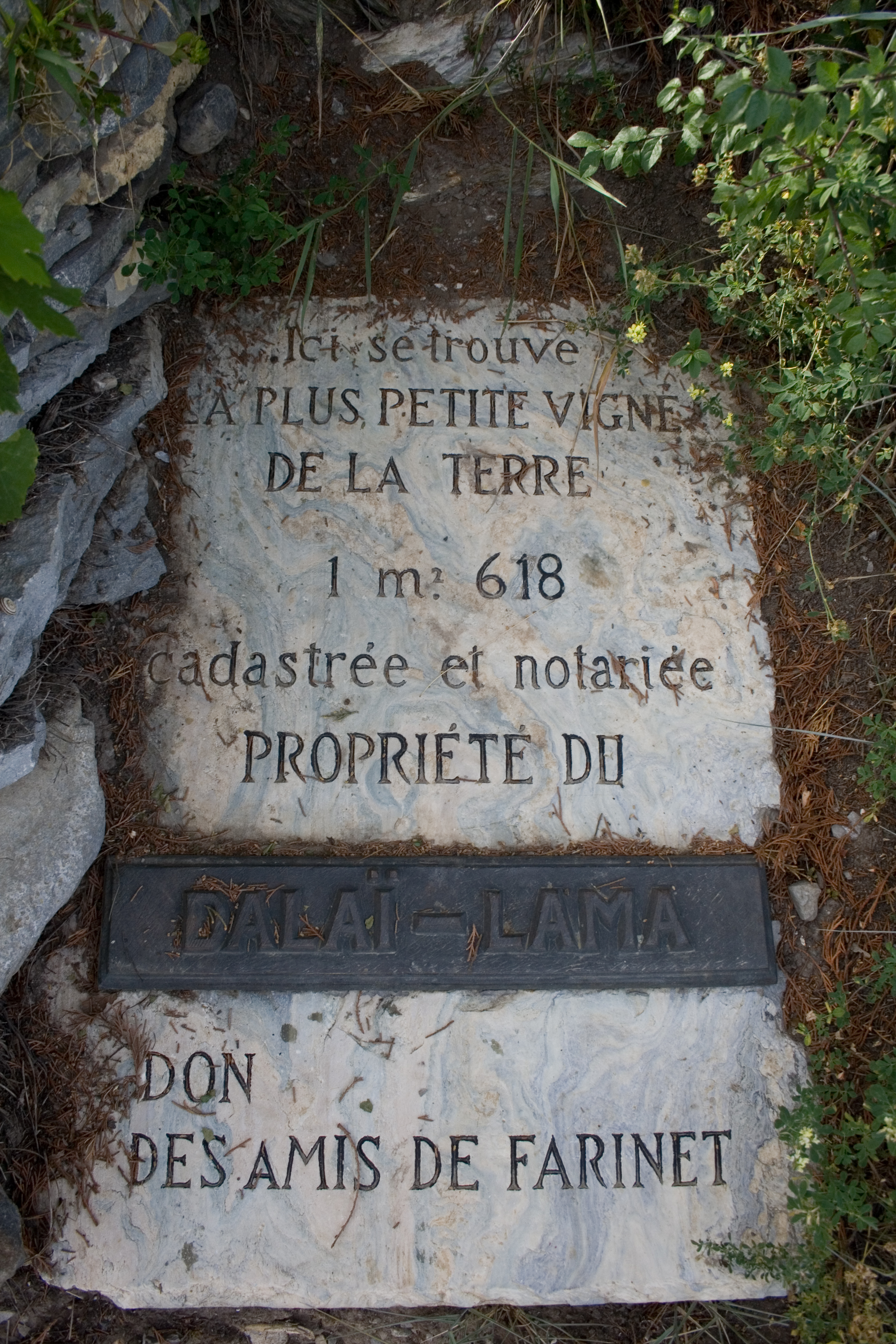 Vigne à Farinet, canton du Valais, Suisse Ici se trouve la plus petite vigne de la terre cadastrée et notariée propriété du Dalai-Lama Don des amis de Farinet